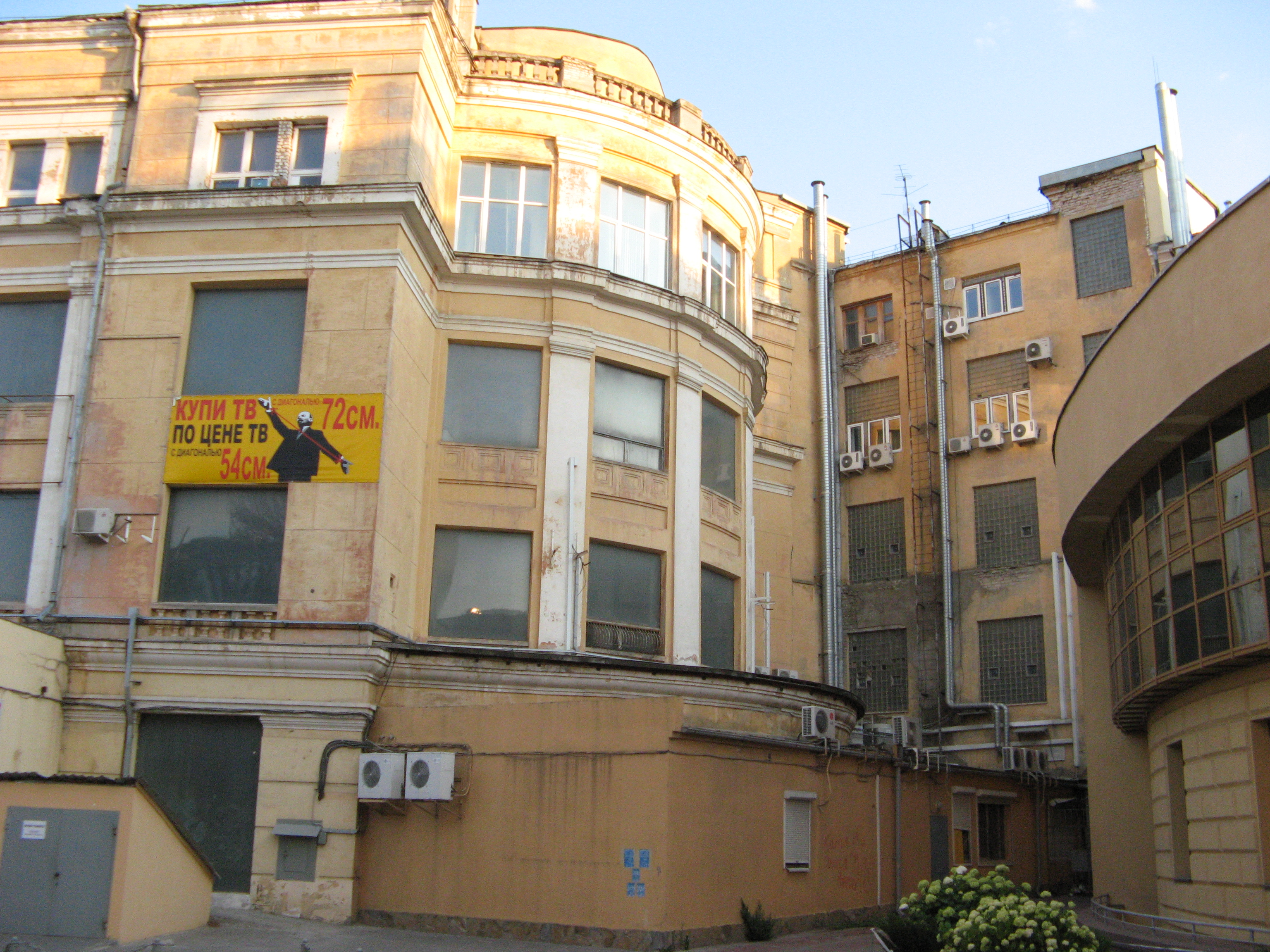 Центральный универмаг: площадь Павших Борцов, 2, Центральный район, Волгоград, Волгоградская область